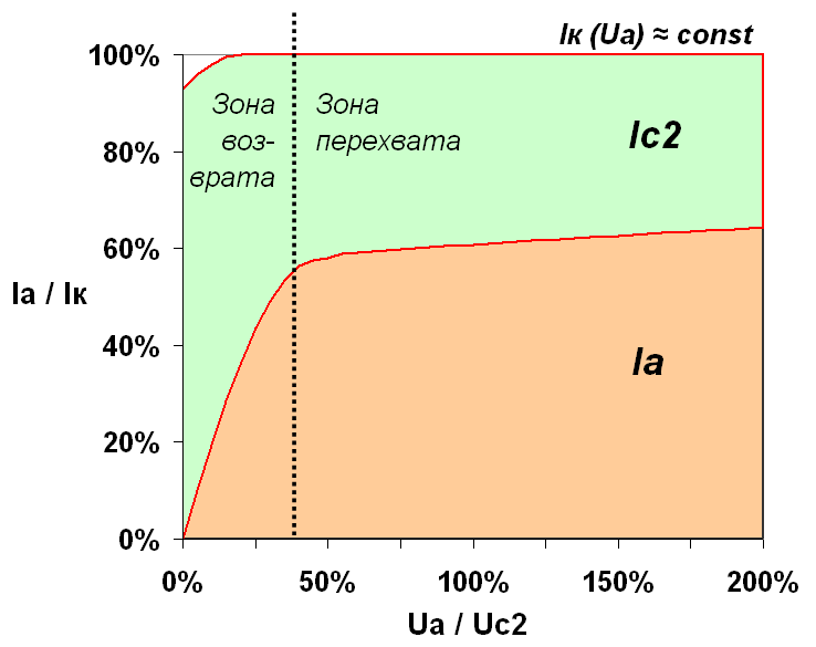 Распределение тока в пентоде при фиксированных напряжениях на всех сетках и переменном напряжении анода. Ток катода, практически не зависящий от анодного напряжения, делится на ток анода (красный) и ток экрана (зелёный). В нормальном рабочем диапазоне напряжений форма кривой распределения практически не зависит от абсолютных значений Ua, Uc2 - только от их соотношения.